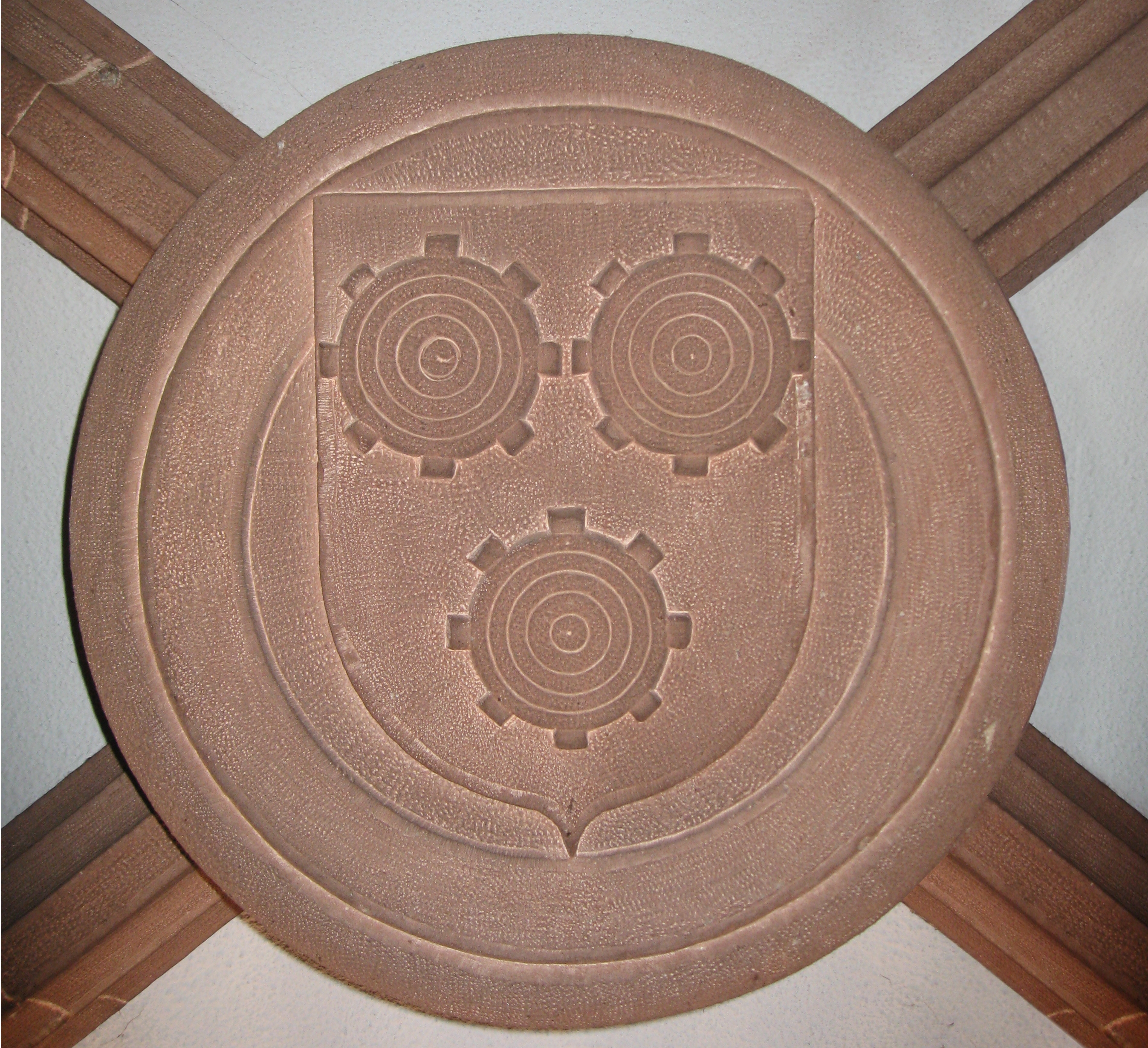 Escut de Francesc Jeroni Marc esculpit a la clau de volta del cor de l'ermita de Bruguers (Gavà, Baix Llobregat)